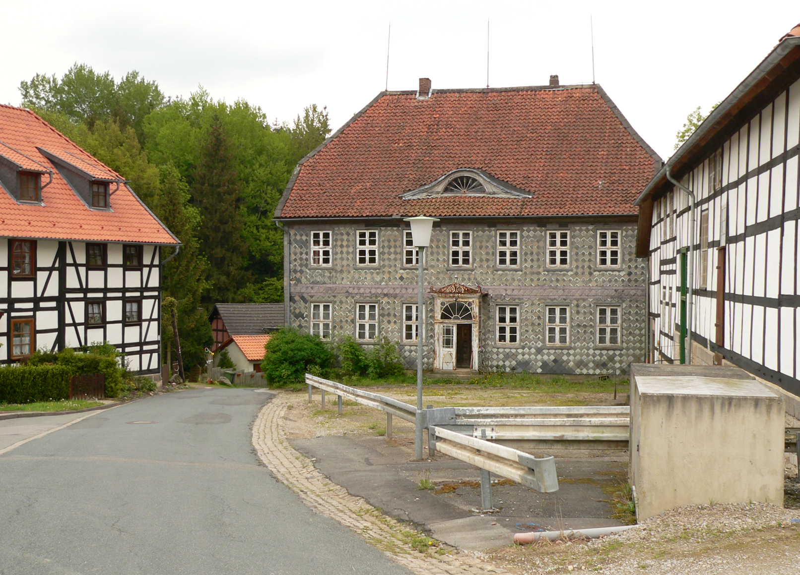 Fabrikantenvilla der Stenderschen Glasfabrik in Glashütte nahe dem Heber